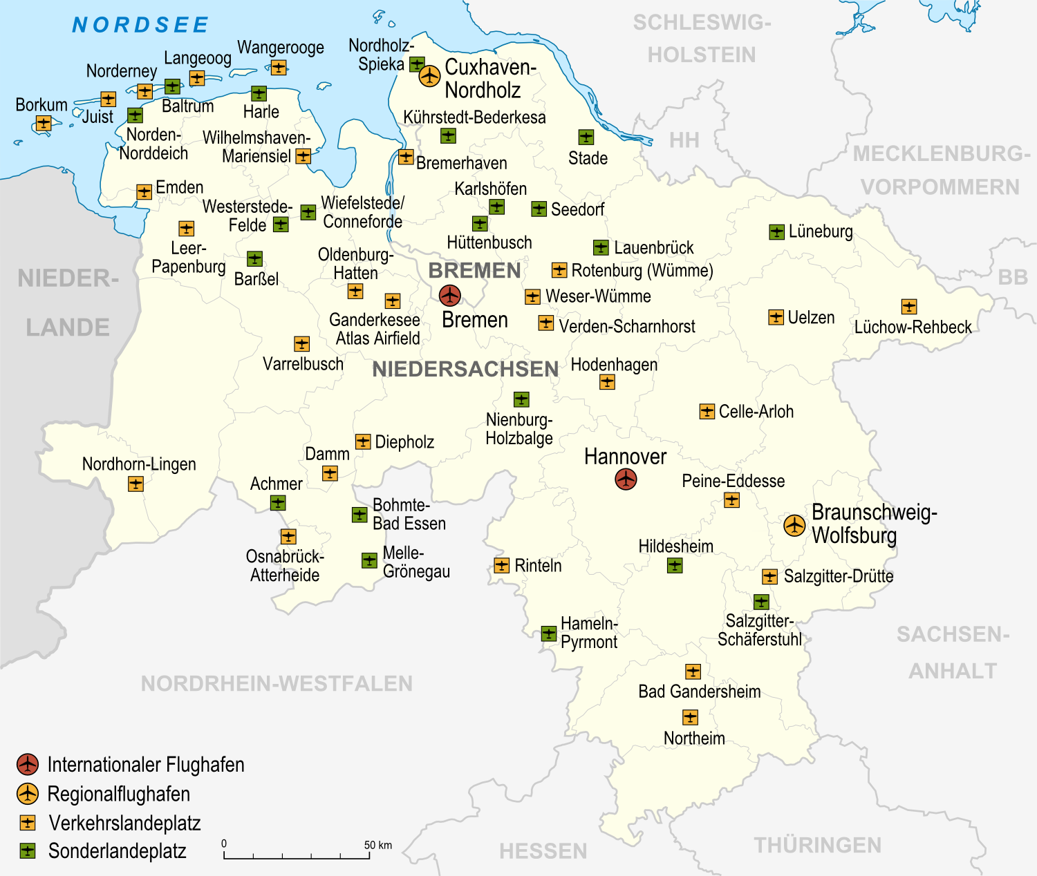 Flughäfen, Verkehrslandeplätze, Sonderlandeplätze und Wasserlandeplätze in Niedersachsen und Bremen, Stand 2007